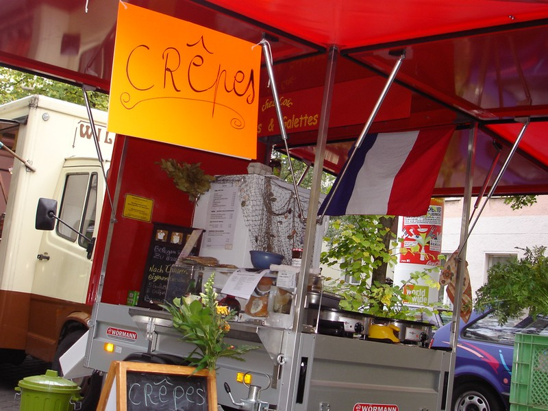 Loïc auf dem Wochenmarkt Karl-August-Platz [1]